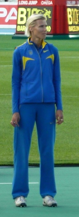 Vita Stiopina